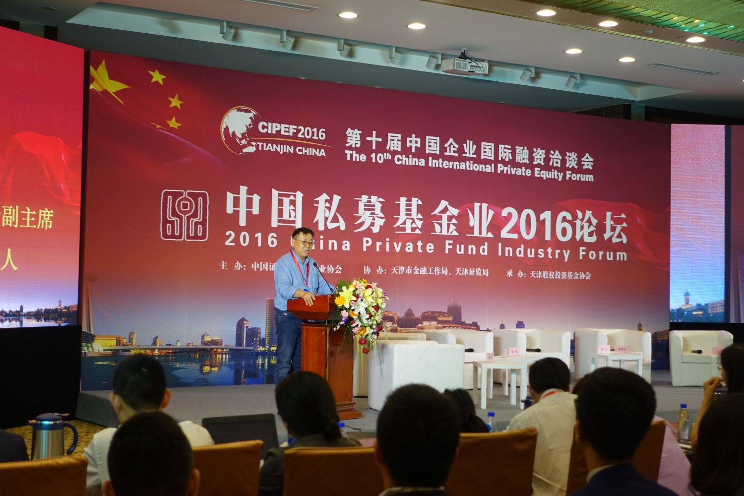 中国私募基金业2016论坛